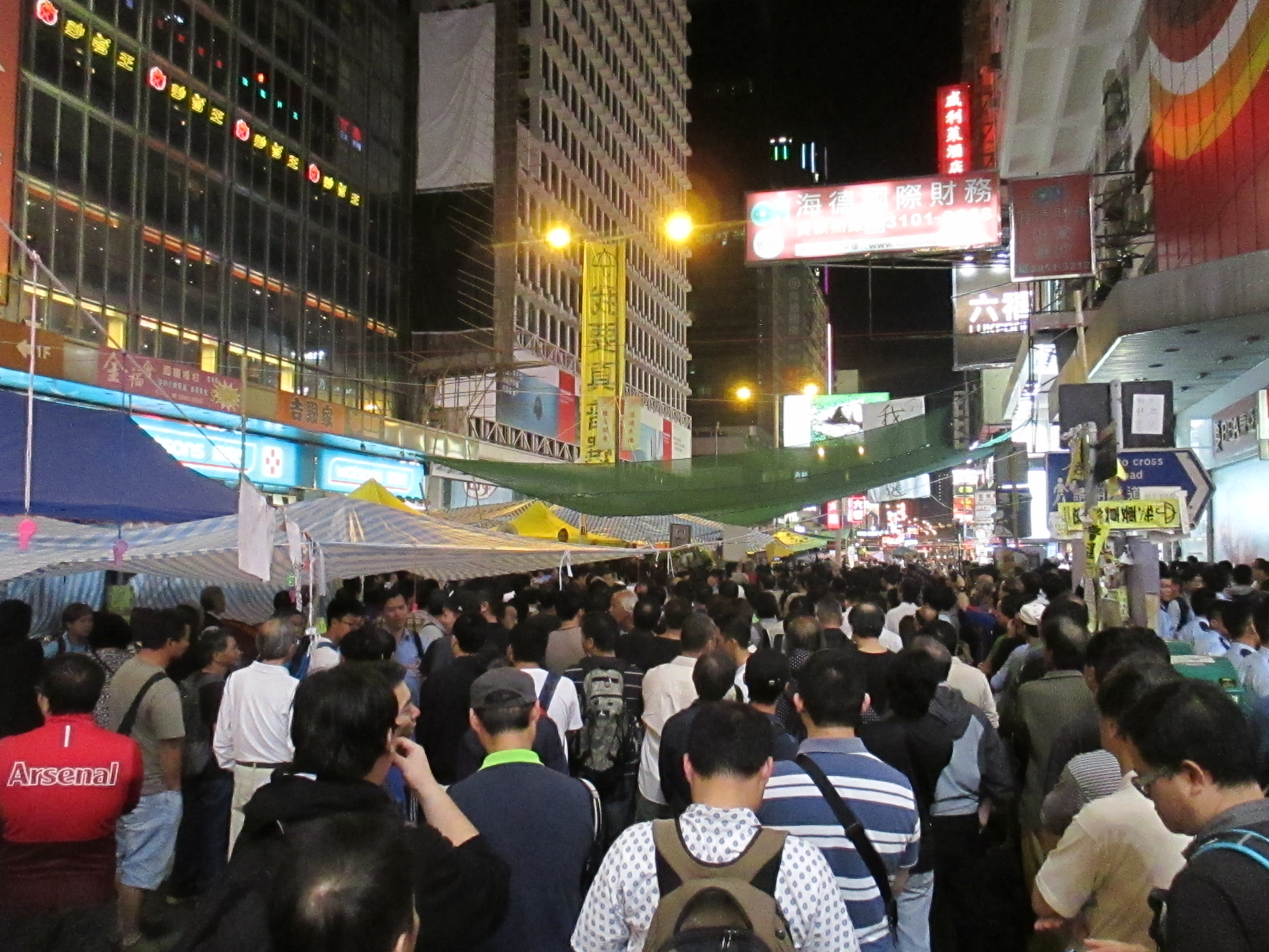 2014年11月24號晚上10時，人民力量義工、支持者、旺角街坊人多勢眾，聲勢浩大。